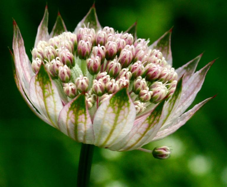 Astrantia major